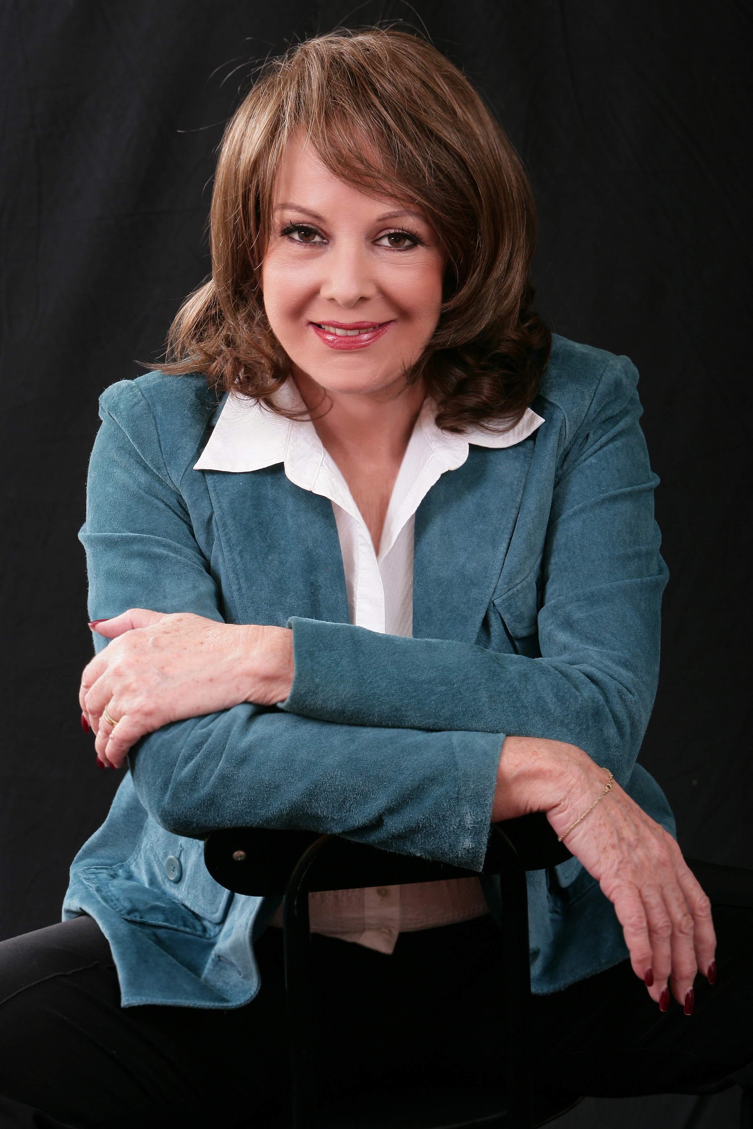 Isabel Moreno Perez